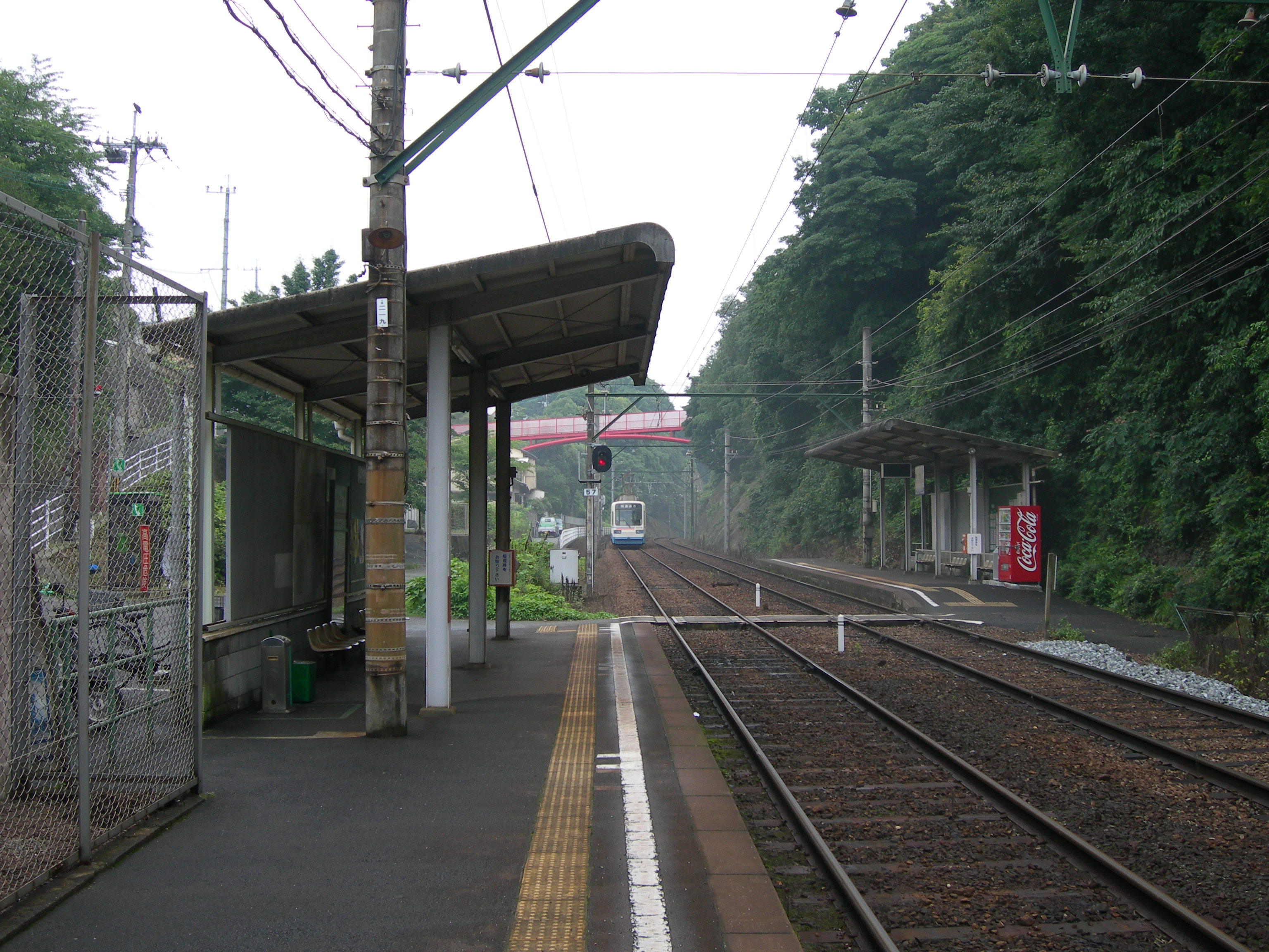 西山駅